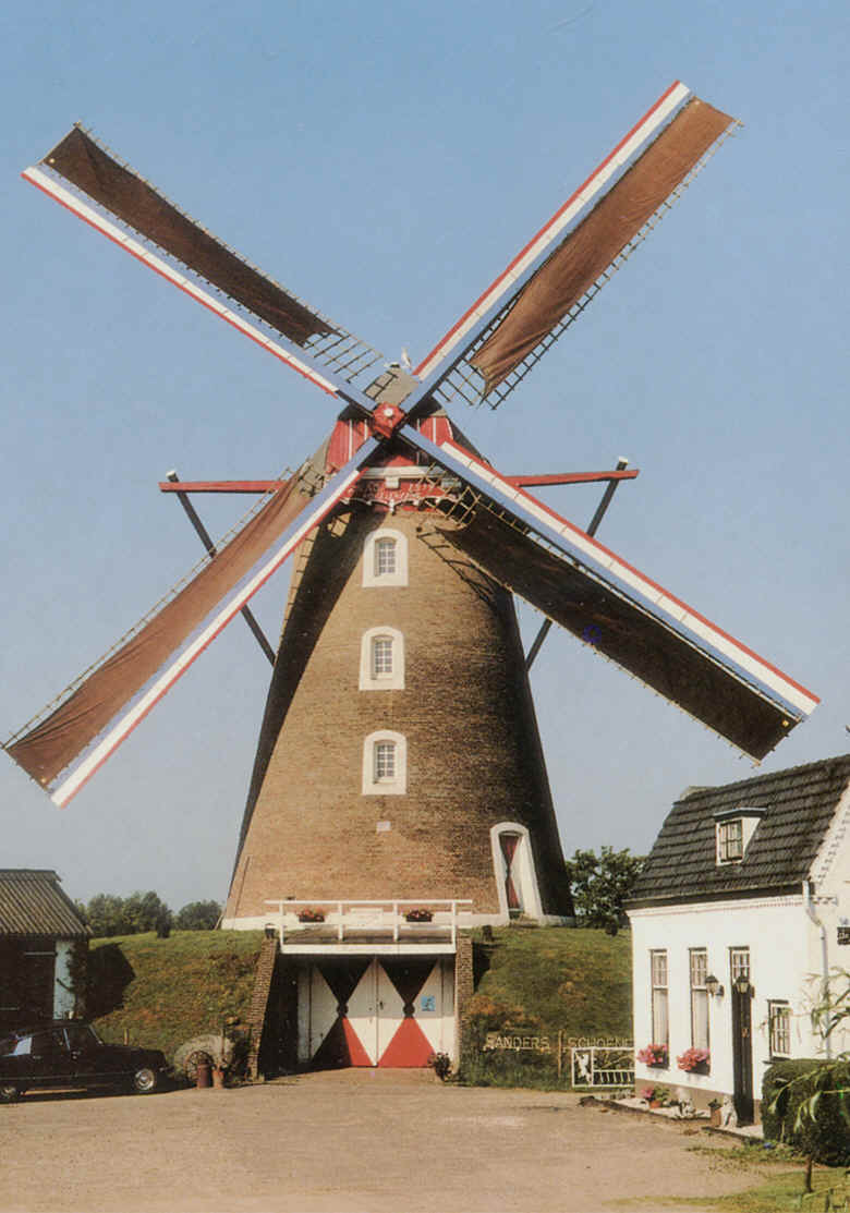 Molen Vogelzang